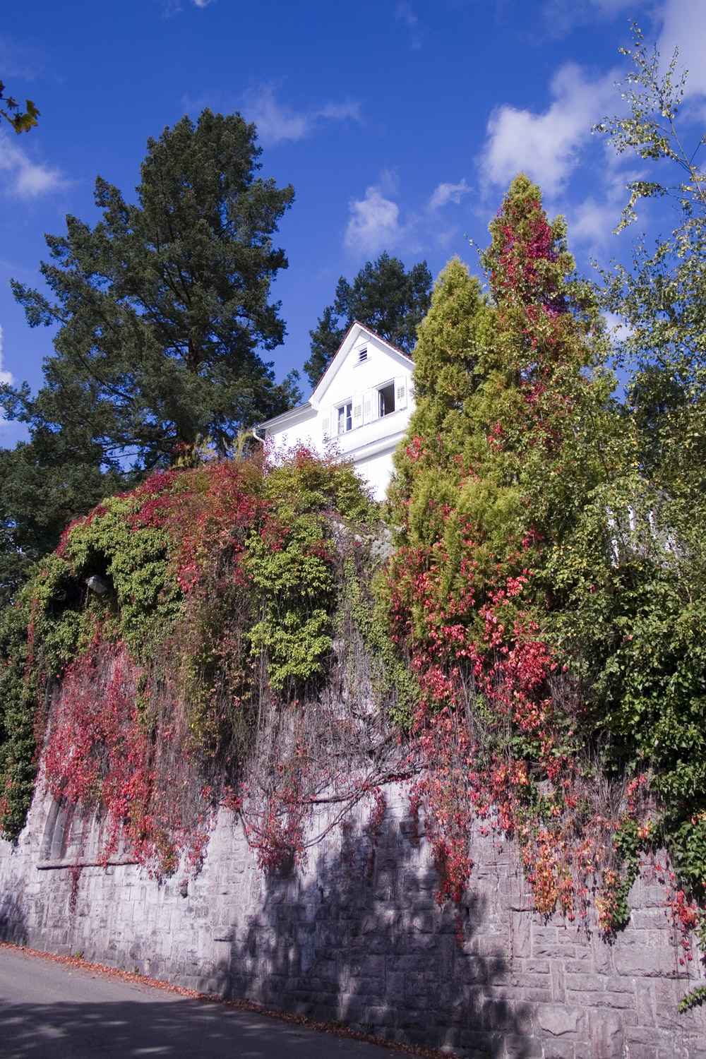 Brahmshaus von unten